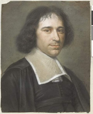 possibly Gilles Ménage